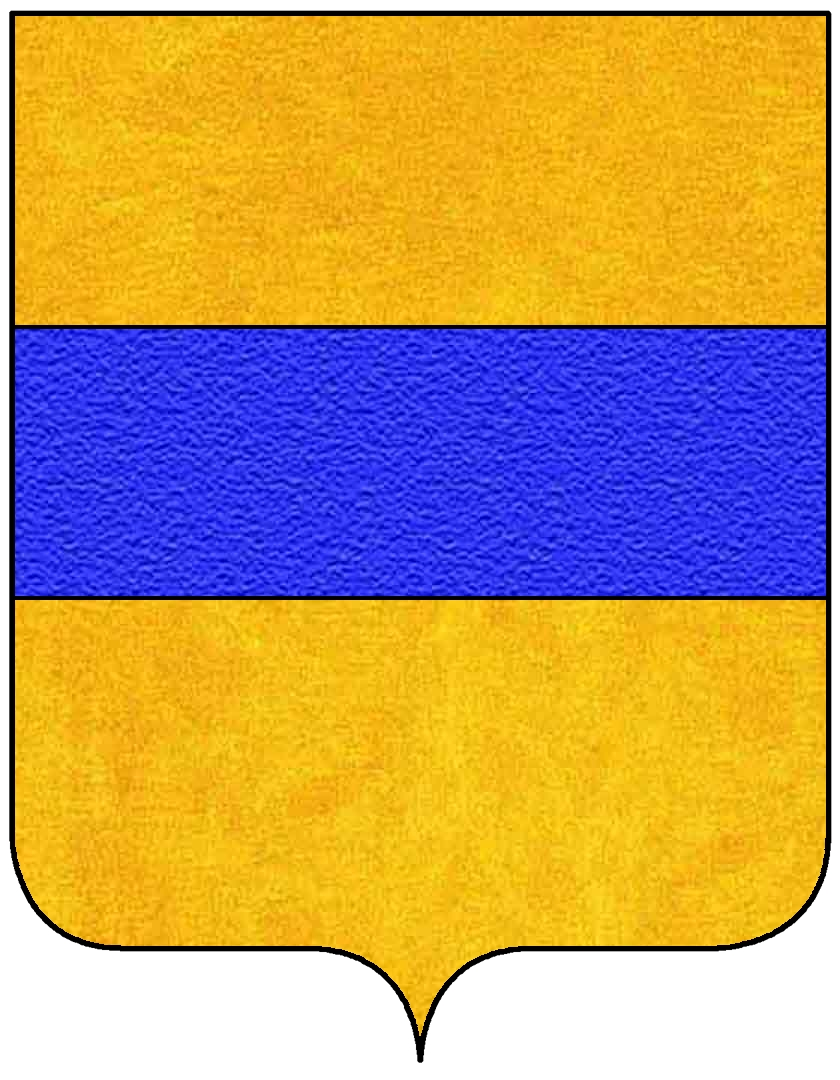 Stemma della famiglia Avarna